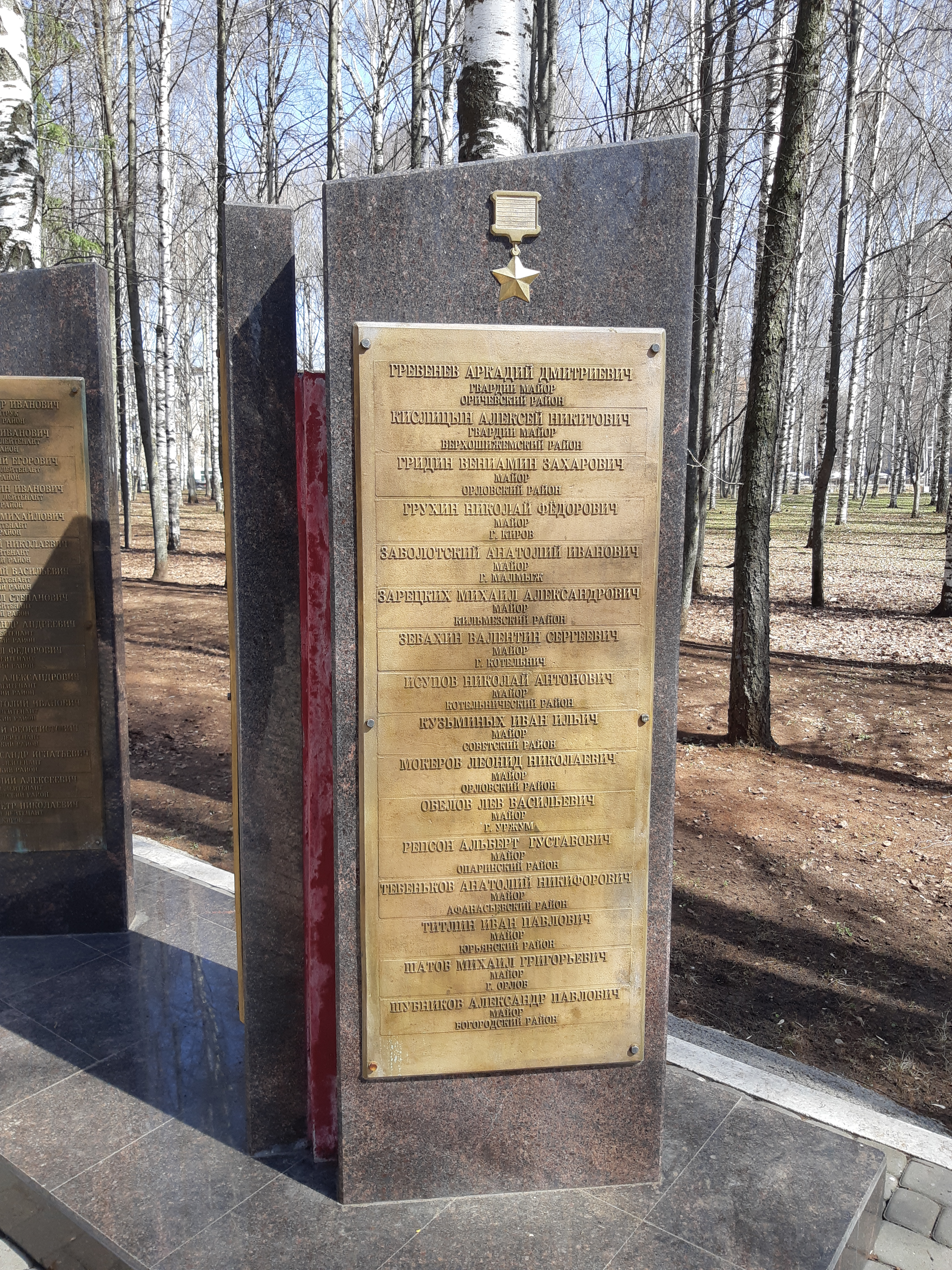 Кировчане Герои (майоры) Киров 2019.